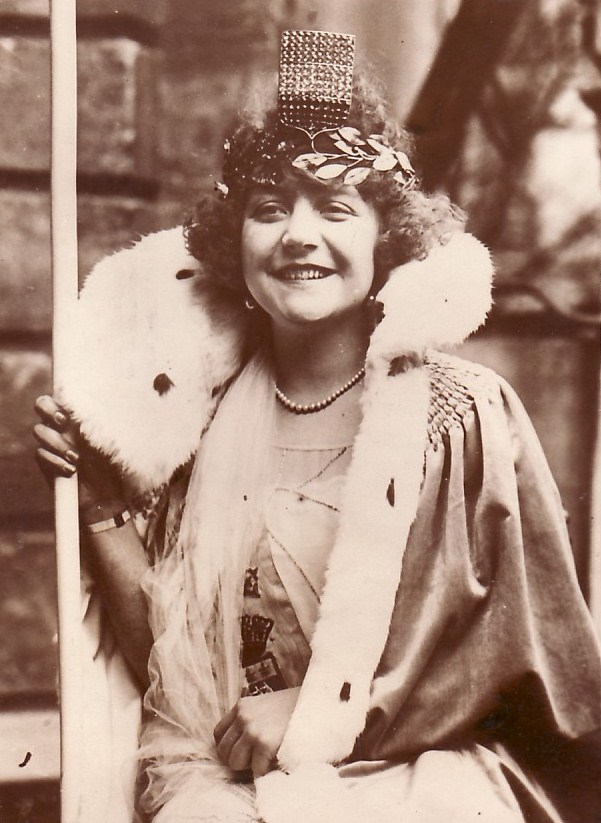 Georgette Fraigneux Reine des Reines de Paris 1925